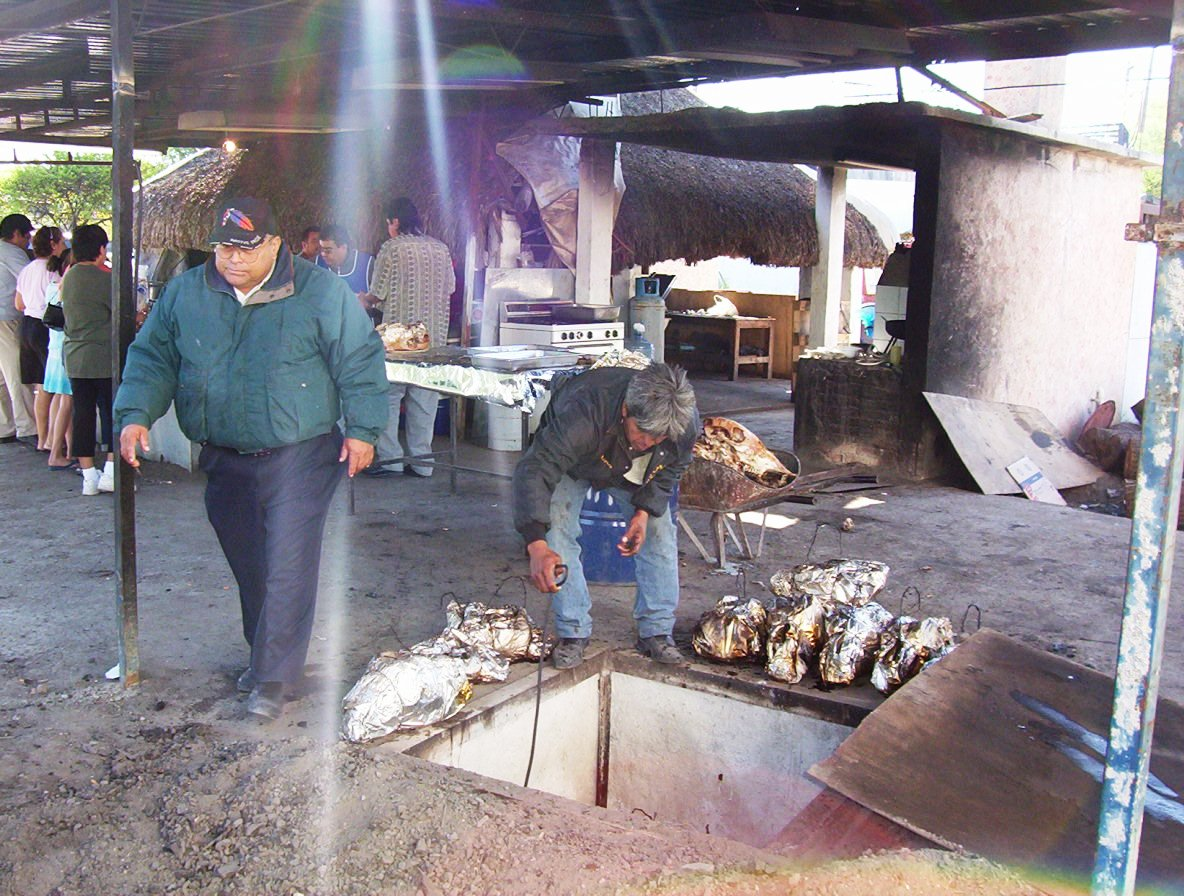 Pozo donde se prepara Barbacoa tradicional